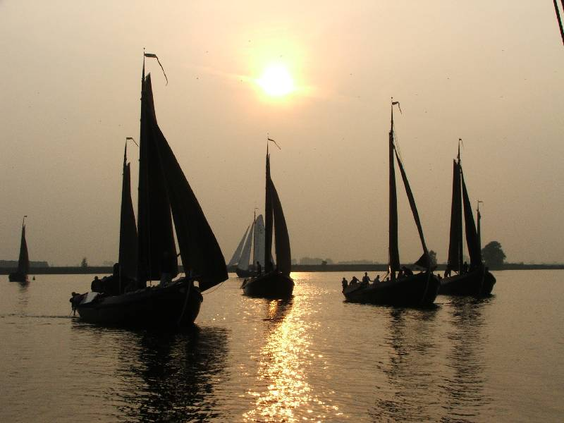 DARP schepen op het randmeer, 2005